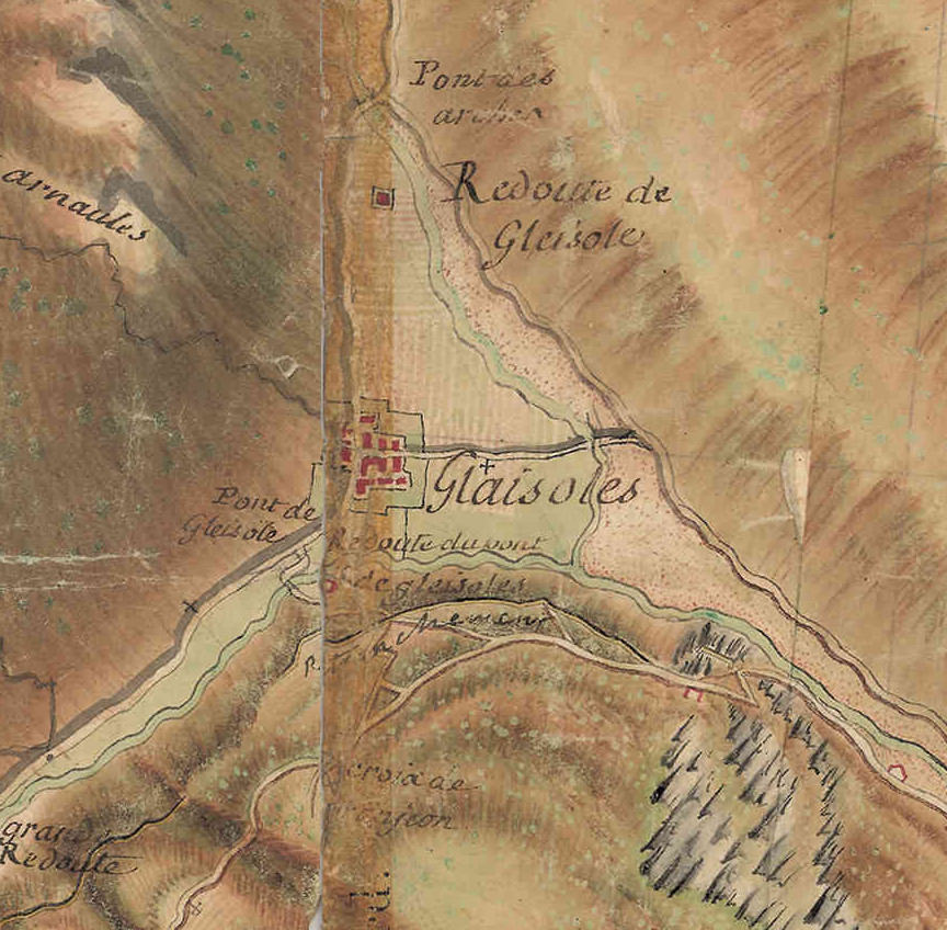 carte de Bourcet numérisé Paris, Nicolas-Alexandre et Olivier-Joseph, Extrait réduc JPG 30% Antoine-H